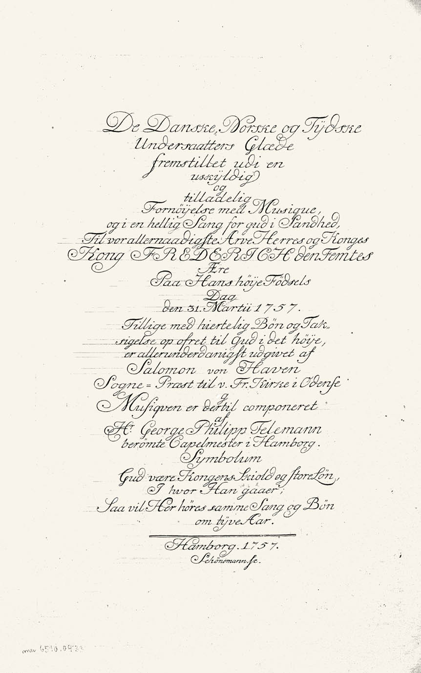 Titelbladet til kantaten «De Danske, Norske og Tydske Undersaatters Glæde» med musik af Georg Philip Telemann og tekst af Salomon von Haven.